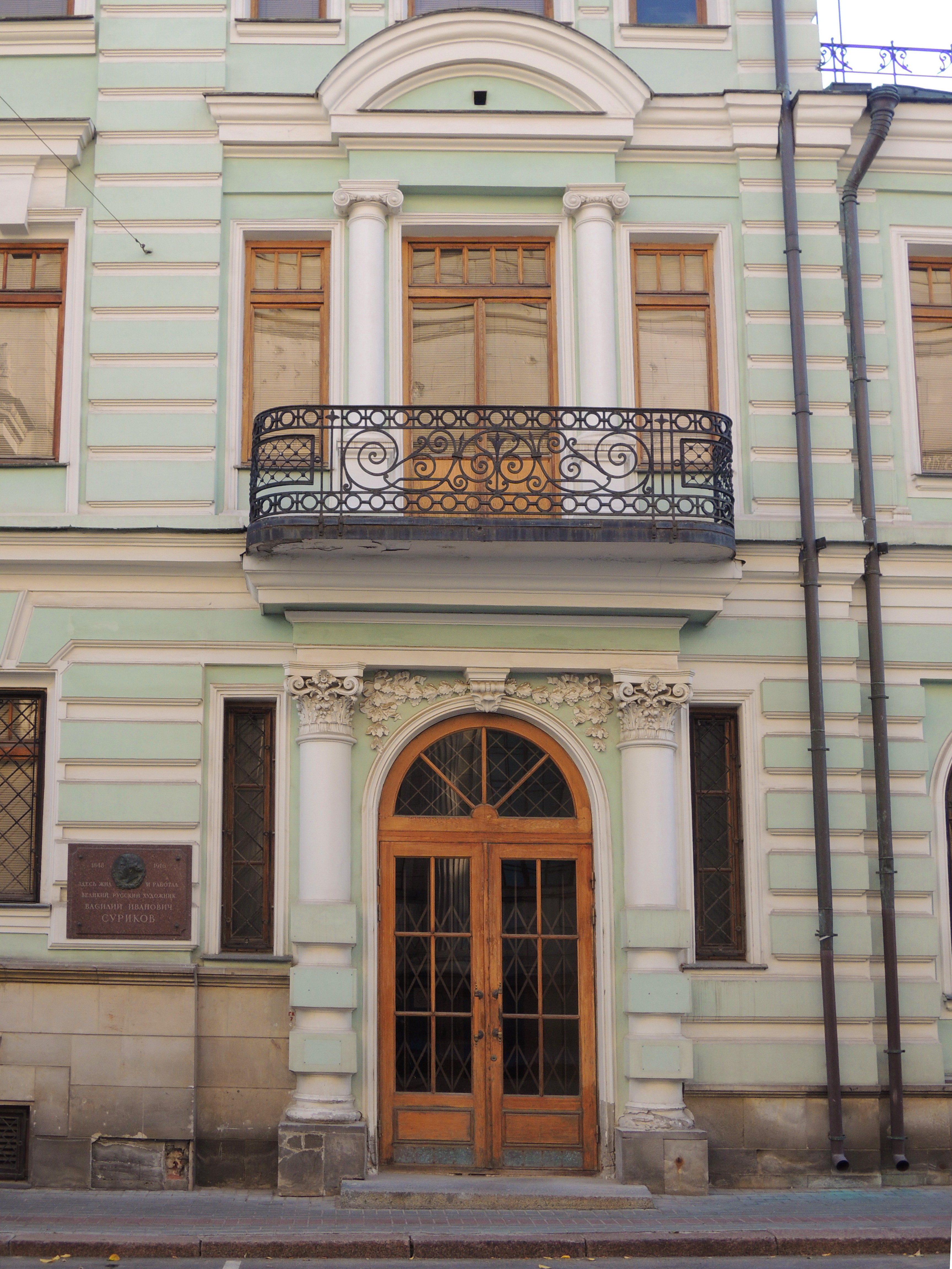 ГМИИ. Галерея искусства стран Европы и Америки XIX–XX вв.